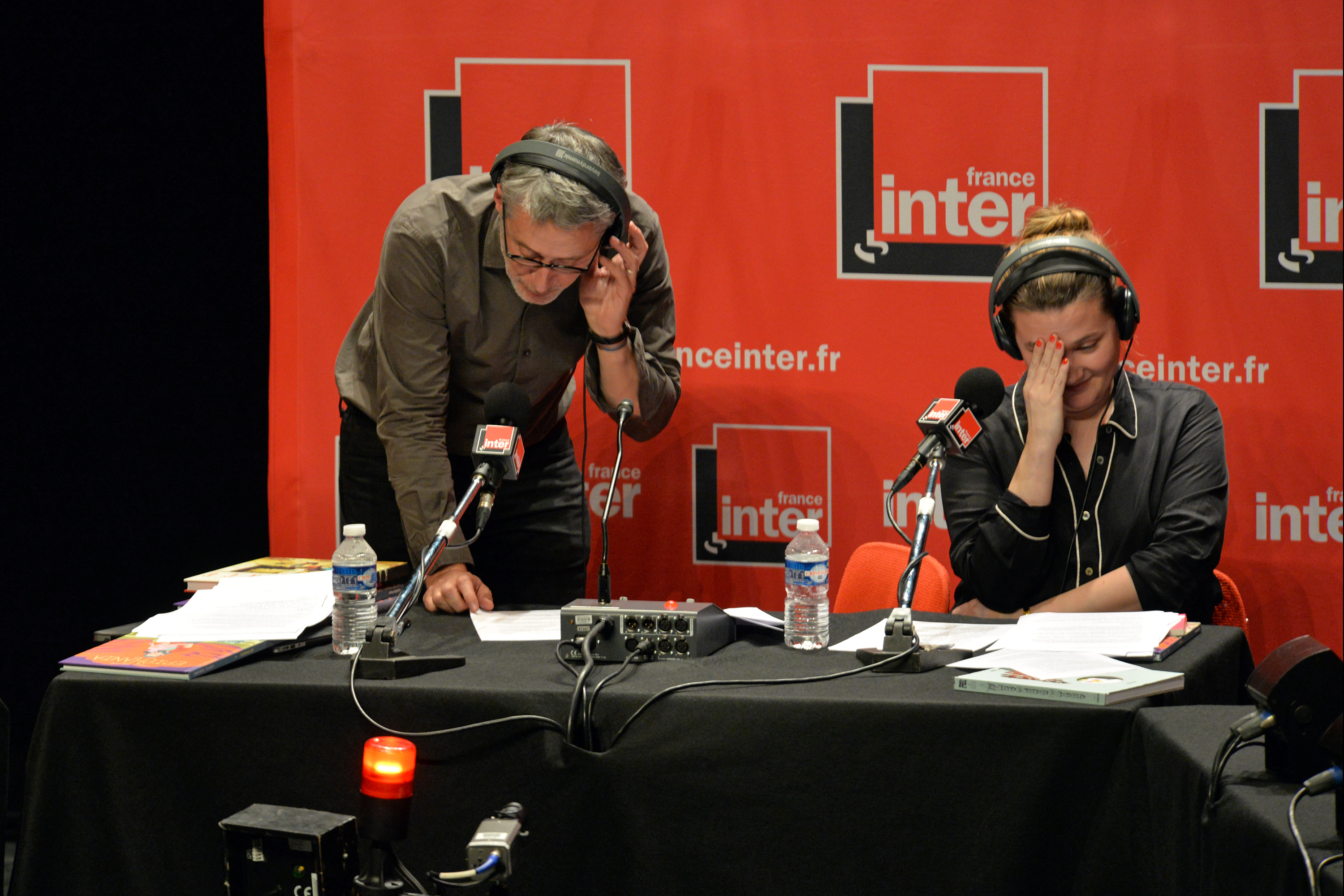 Emission Popopop avec Antoine de Caunes et Charline Roux, Festival d'Angoulême 2018.